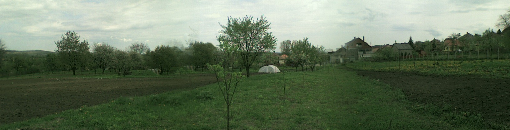 Sajóivánka, 3720 Hungary